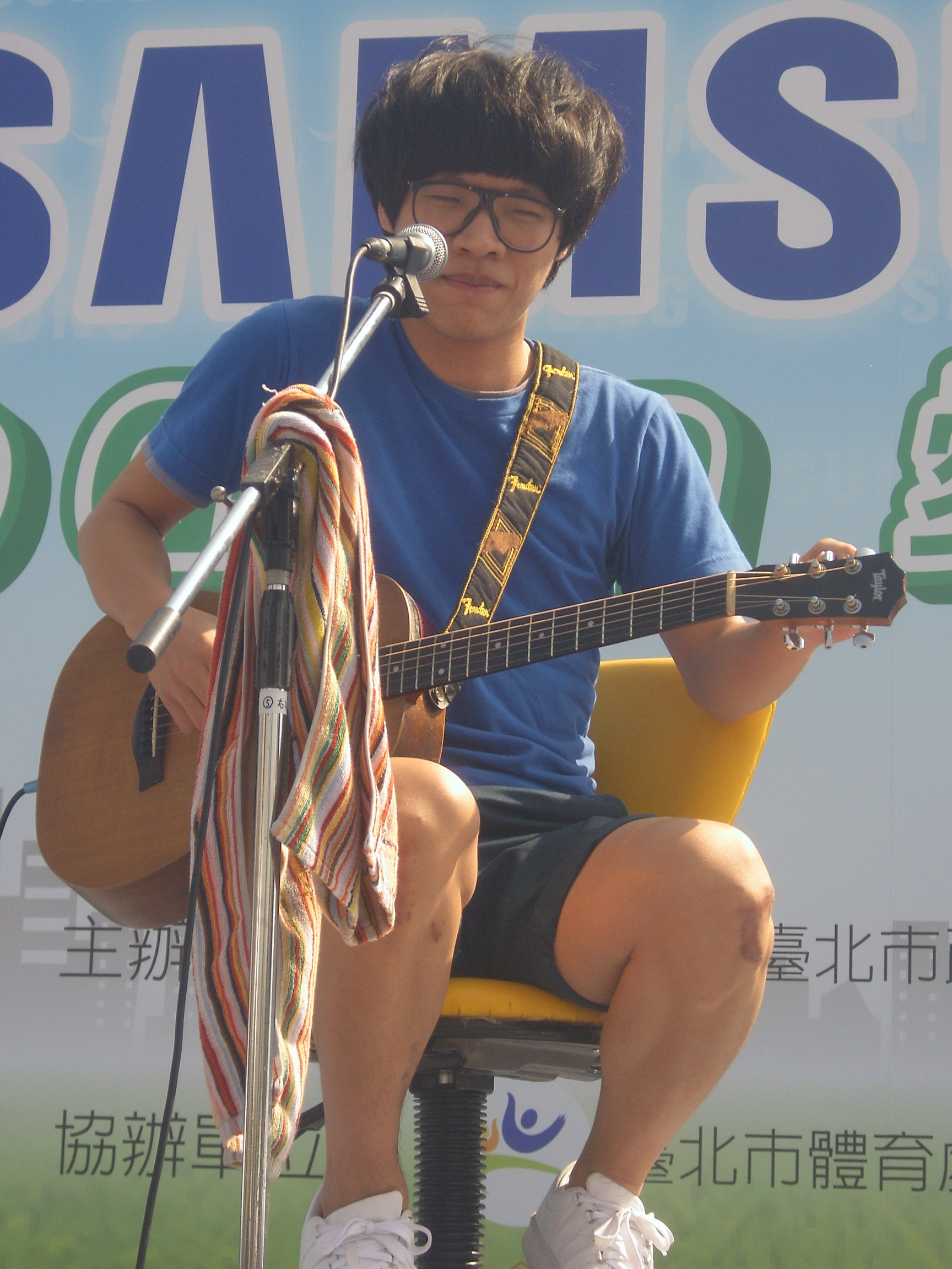 中文（台灣）: 2009年三星活力路跑，盧廣仲現場演唱。Bân-lâm-gú: 2009-nî Sam-sing Ua̍h-li̍k Lōo-pháu, Lôo Kóng-tiōng(盧廣仲) hiàn-tiûnn ián-tshiùnn-huē.